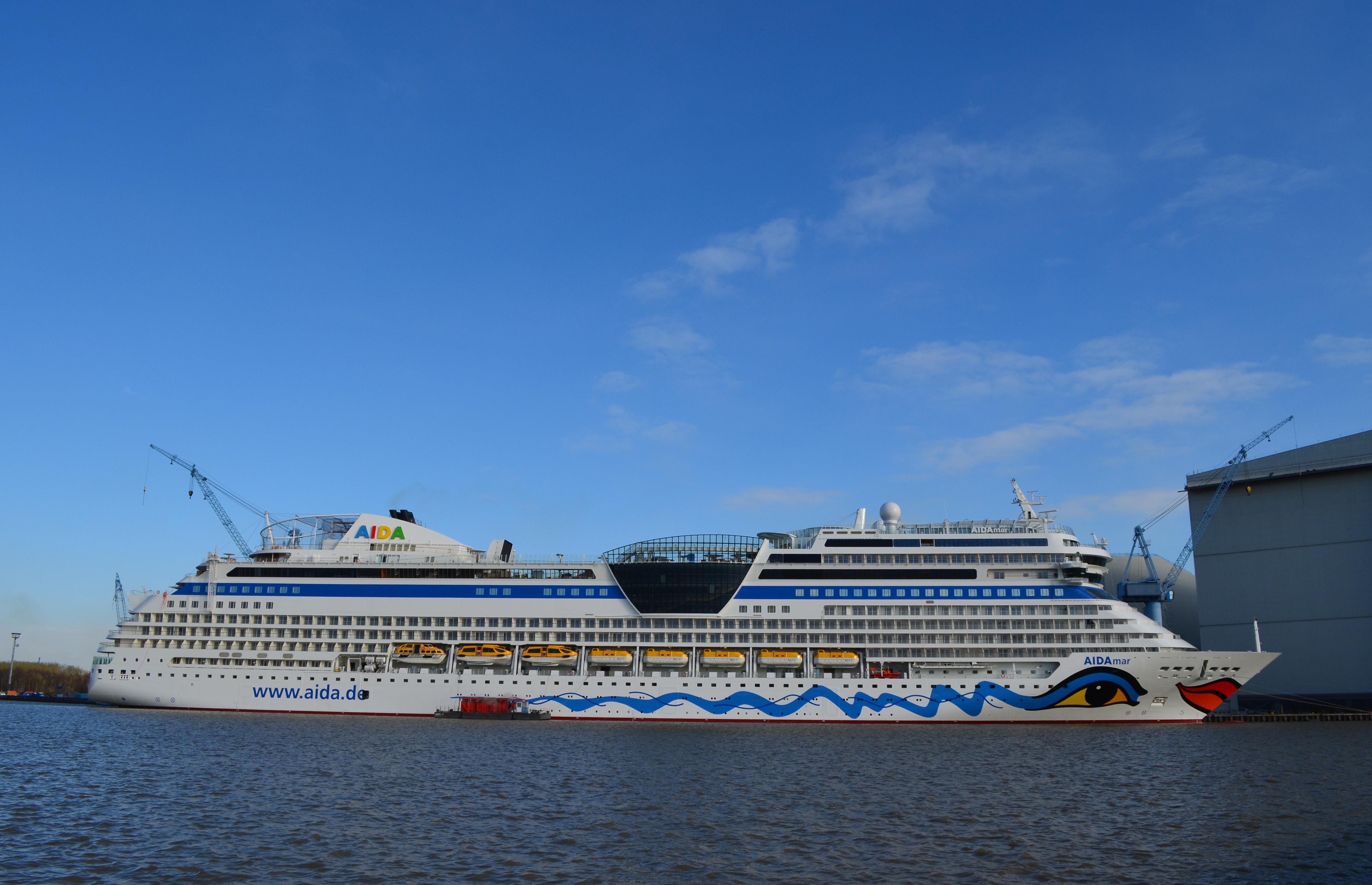 Das neue Kreuzfahrtschiff AIDAmar vor der Schiffbauhalle der Meyer-Werft in Papenburg.